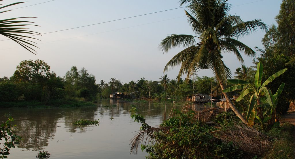 Khung cảnh một vùng quê tai Huyện Tam Bình , Tỉnh Vĩnh Long